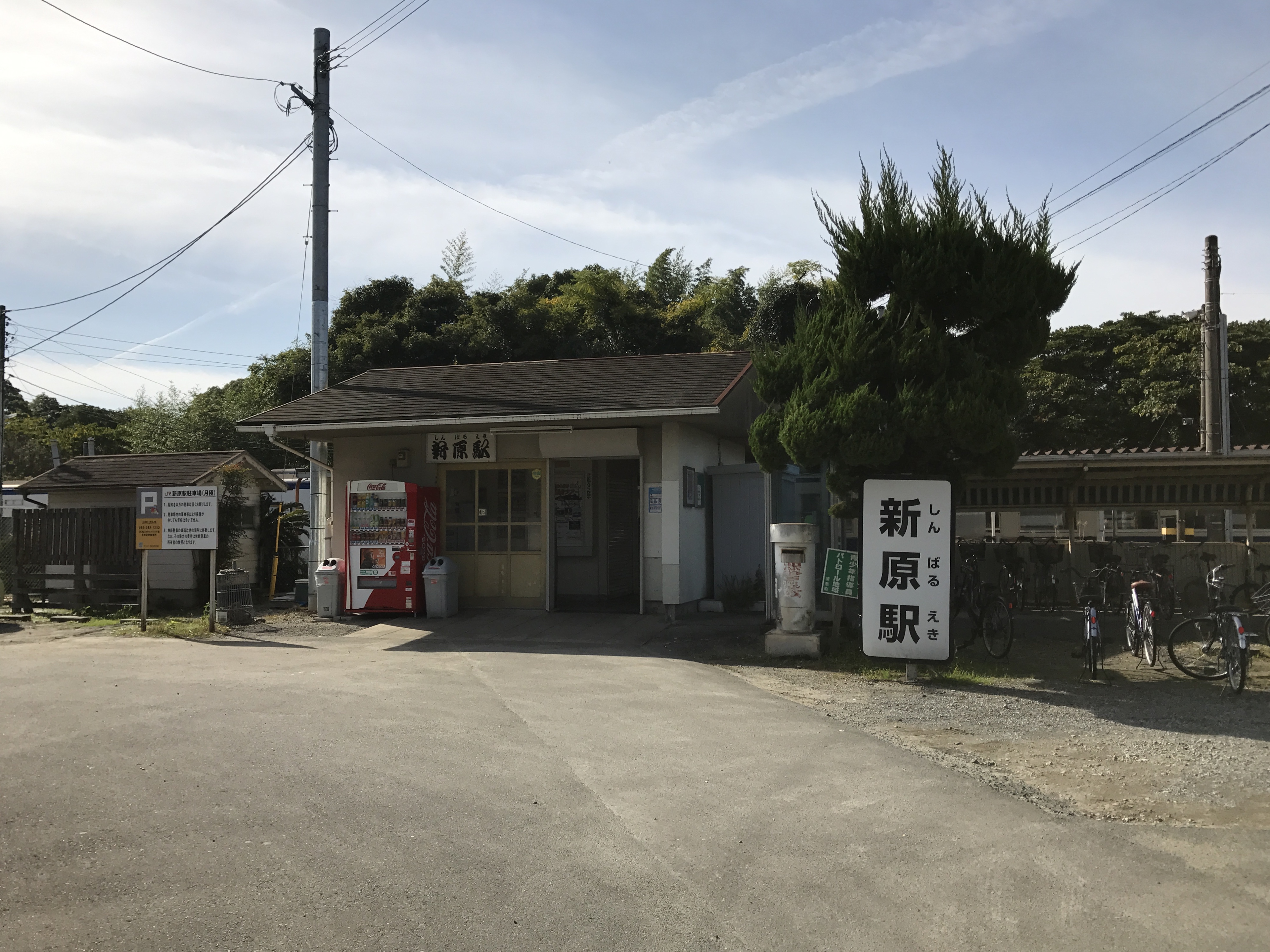 新原駅の遠景